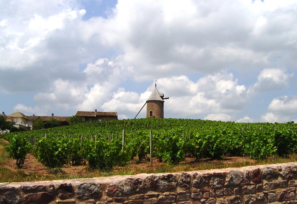 Die Mühle, "Moulin de Romanèche-Thorins". Eigenes Foto von User:Ile-de-re aufgenommen am 26.06.2006